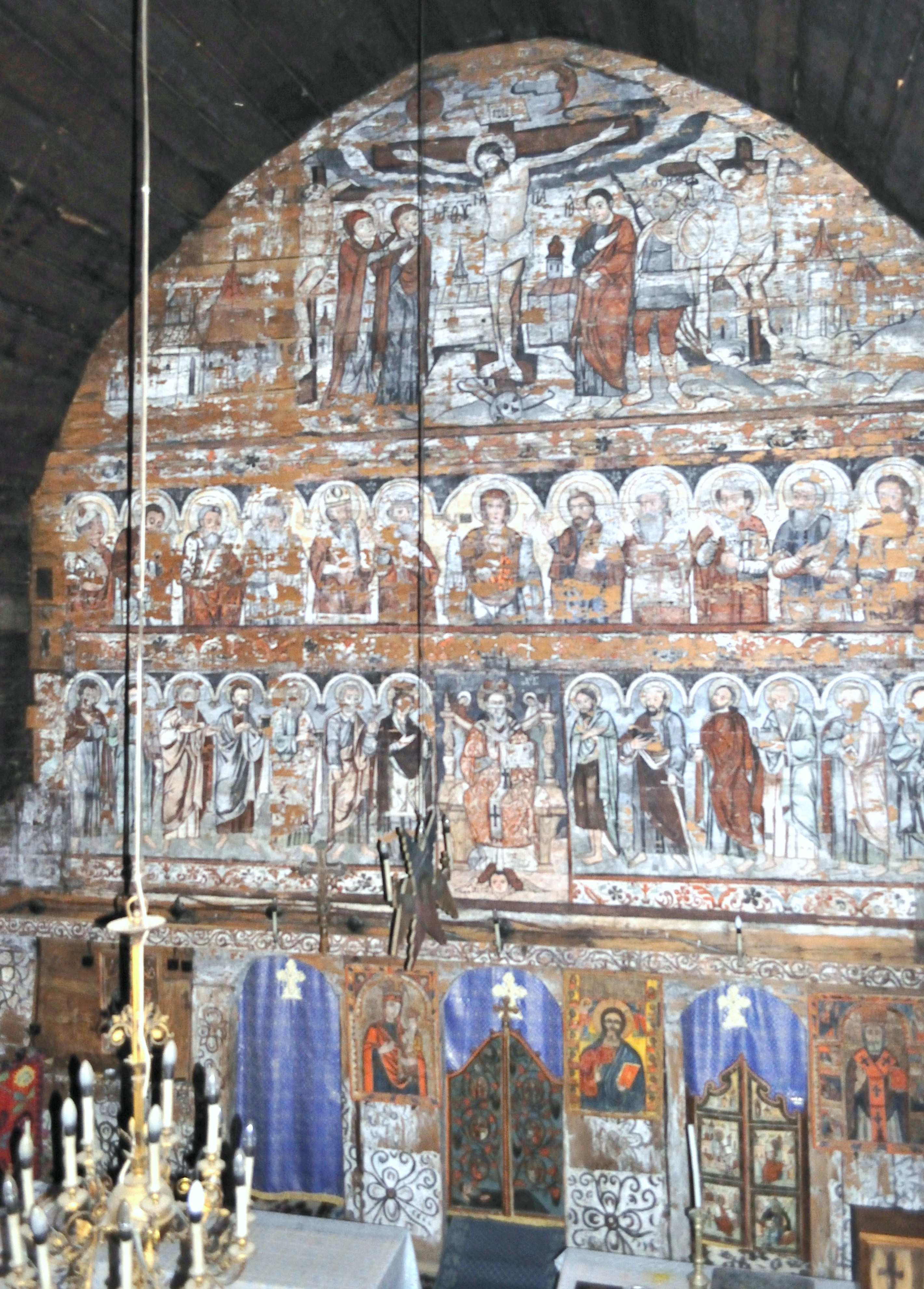 Biserica de lemn din Budești-Josani, județul Maramureș